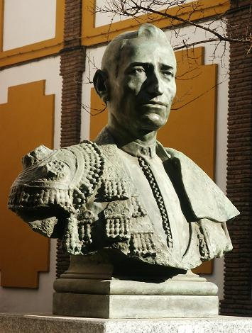 Busto del torero cordobés Lagartijo en la calle Osario de esta ciudad.